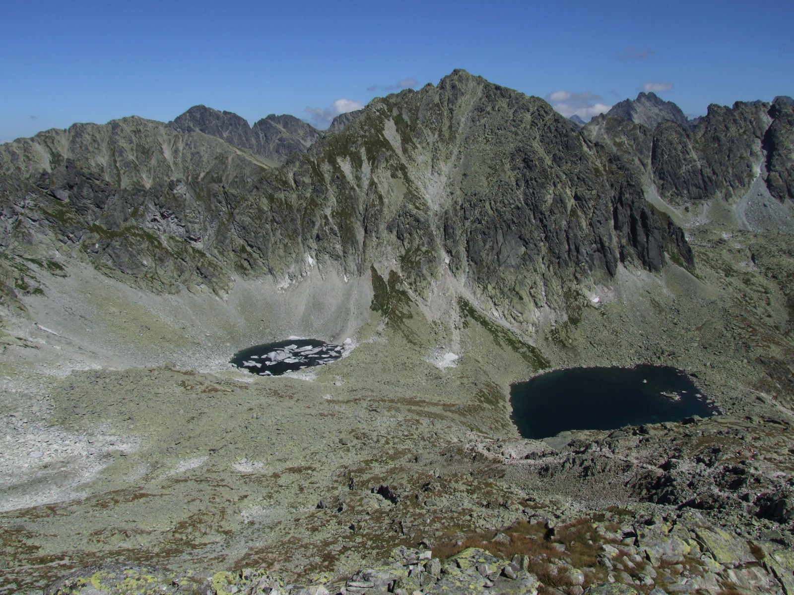 Dolina Młynicka (Tatry Wysokie). Kolisty Staw i Capi Staw. Na Kolistym Stawie lód (23 sierpień 2004)